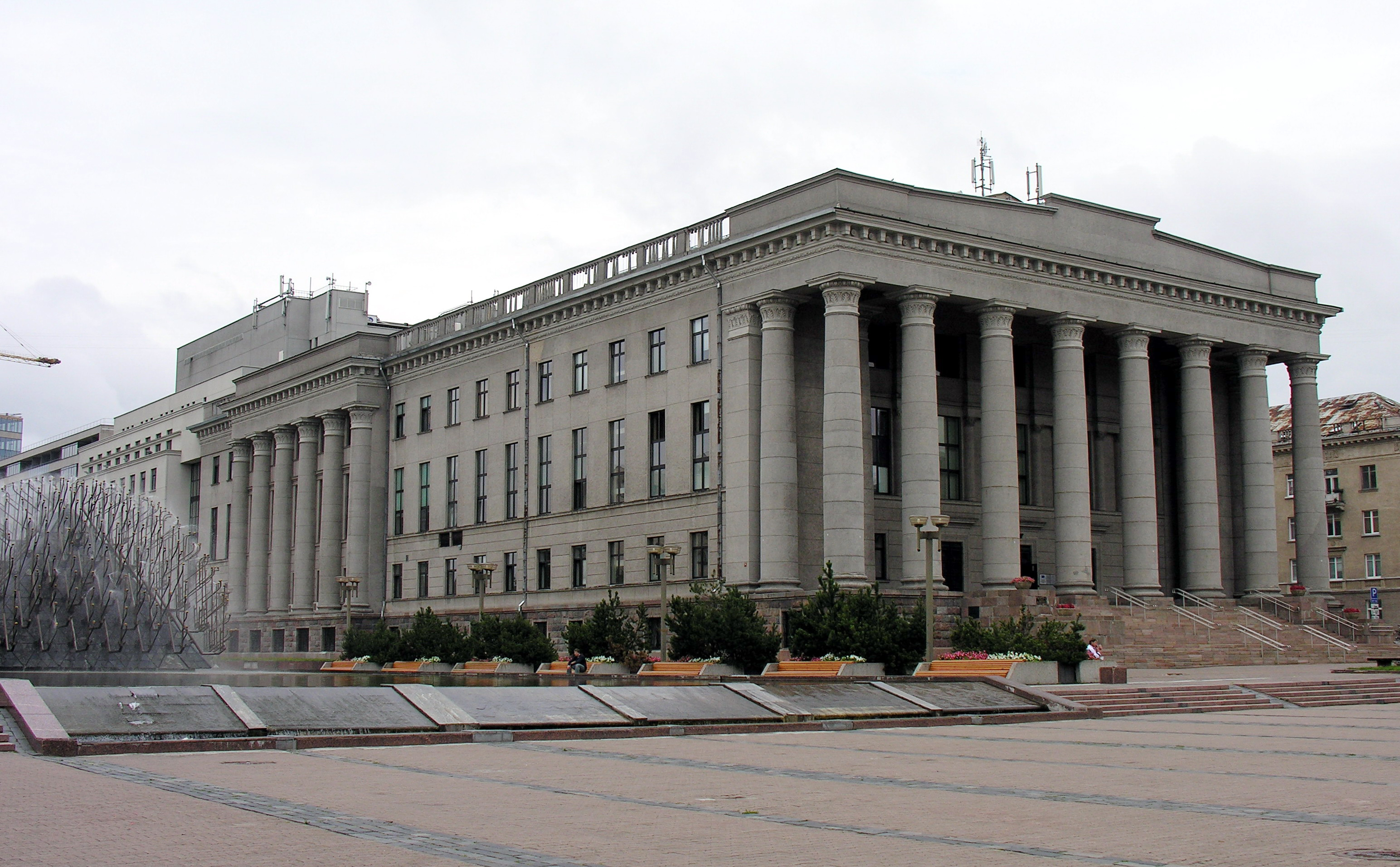 Nacionalinė Martyno Mažvydo biblioteka Foto: Algirdas, 2006 m. rugpjūčio 8 d., Lietuva Martynas Mažvydas National Library of Lithuania. Projected and constructed in 1959-1963. Architect Viktor Anikin, engineer Ciprijonas Strimaitis.